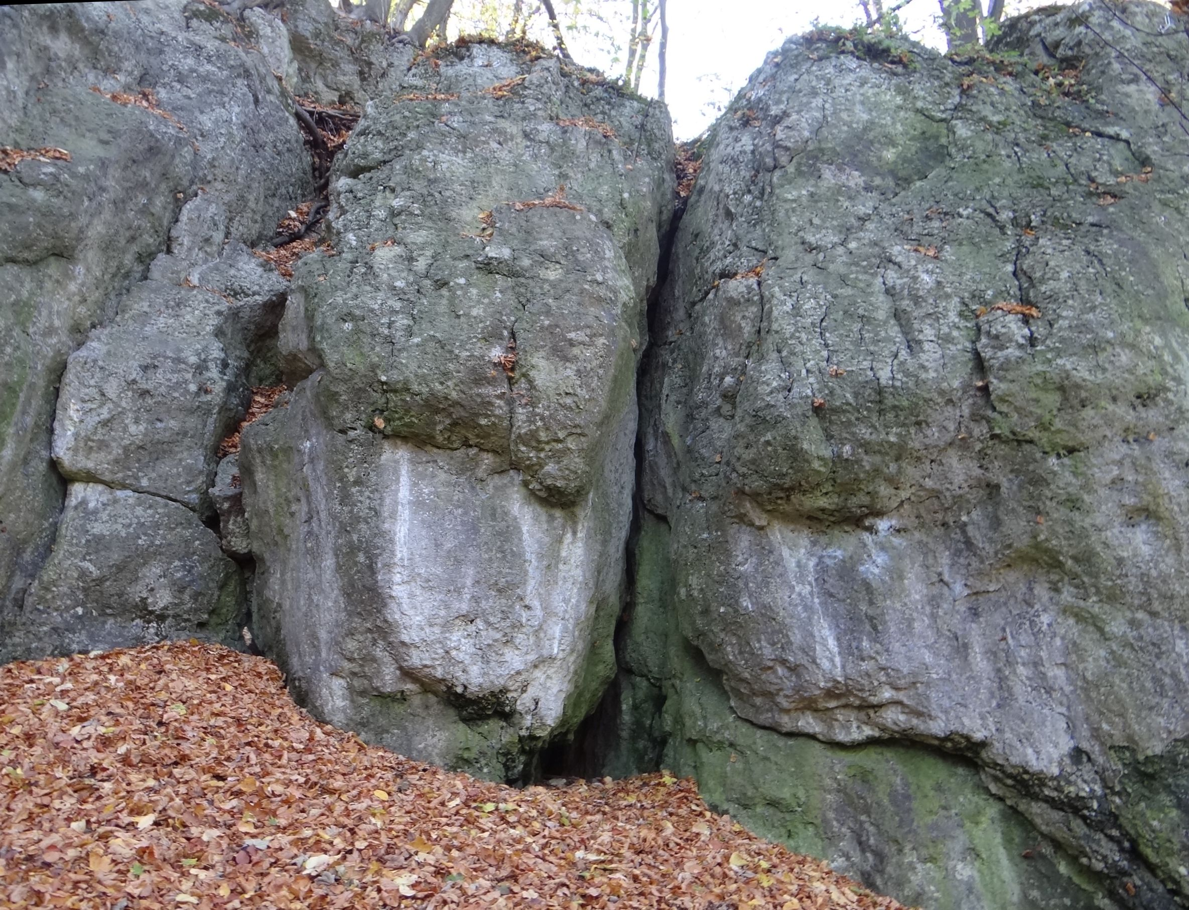 Szczelina przed Gajówką w Kawalerskich Skałach w Lesie Wolskim w Krakowie